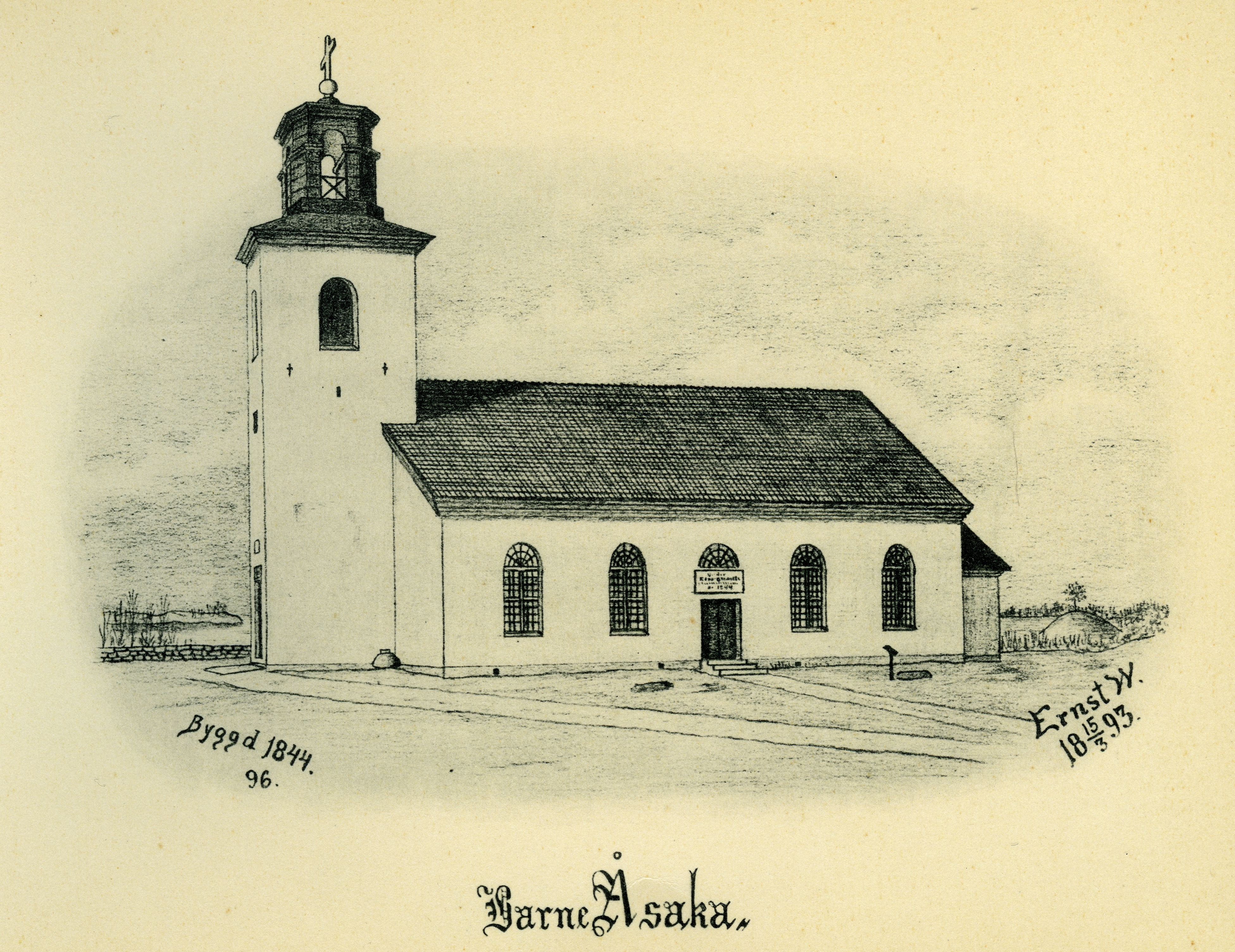 Barne-Åsaka kyrka år 1893 i Barne härad, Skara stift, Västergötland, Sverige. Kyrkan är byggd 1844. Teckning av Ernst Wennerblad ur Skara stifts kyrkor (1902).